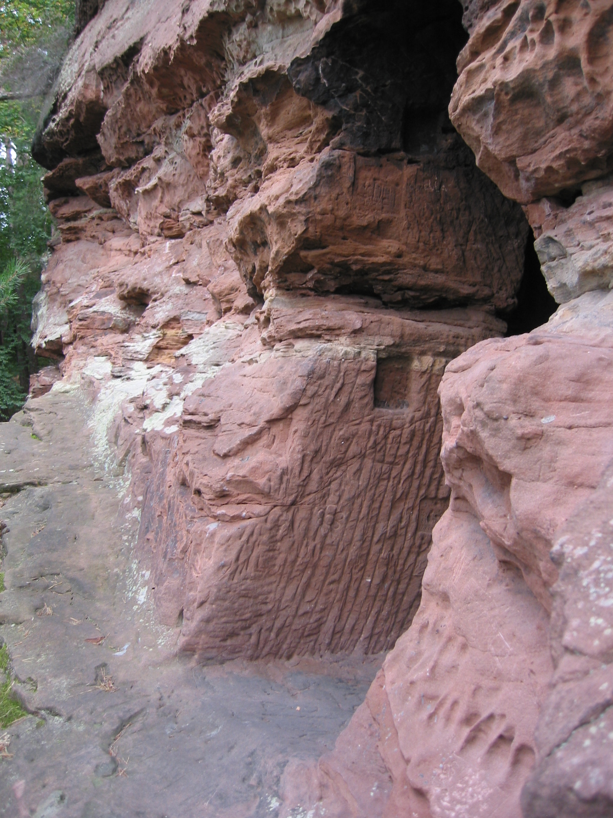 Eingang zu den Buchkammern auf dem Heidenberg (Wasgau Felsenland)